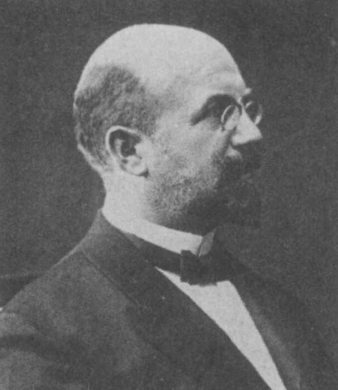 Foto von Friedrich List